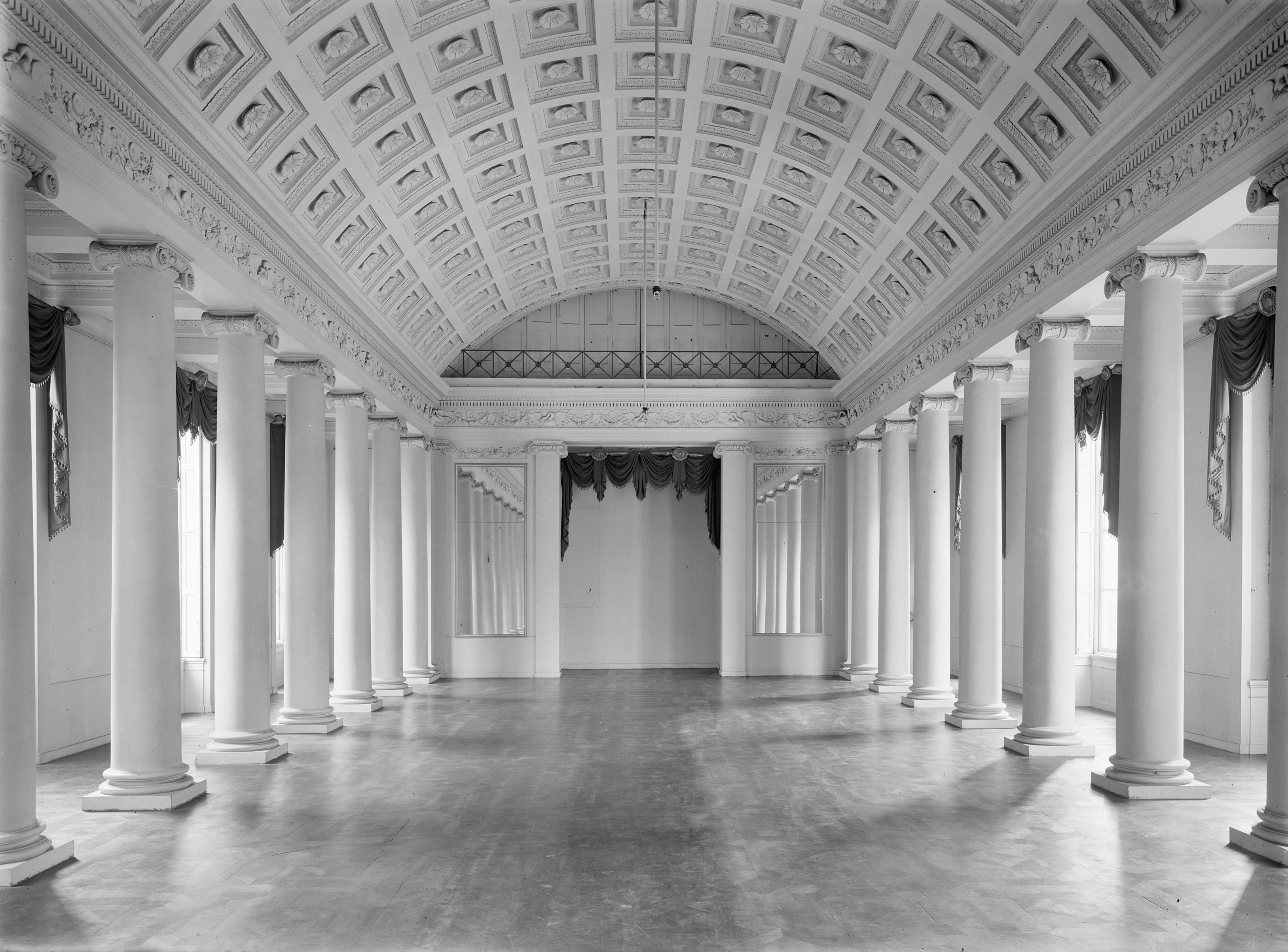 Paleis Kneuterdijk: interieur driebeukige balzaal